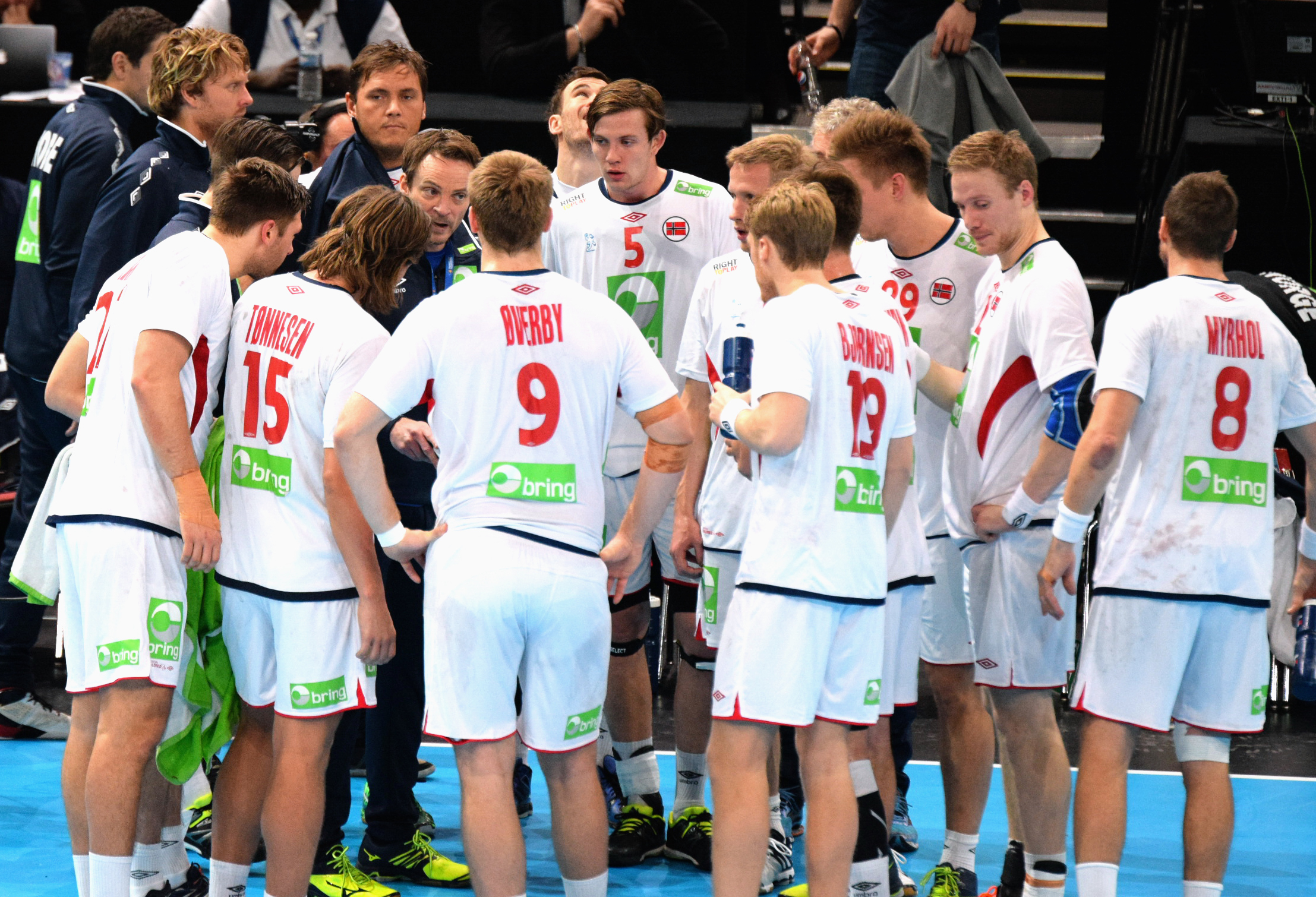 Christian Berge et l'équipe de Norvège , le 10 janvier 2016 lors du match Norège / Qatar durant la Golden League à l'AccordHotel Arena (Paris).